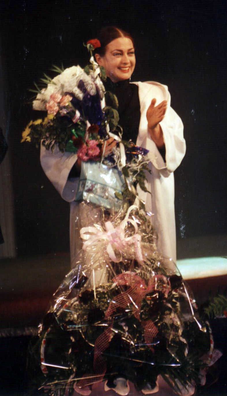 Українська акторка, народна артистка України Ярослава Мосійчук.